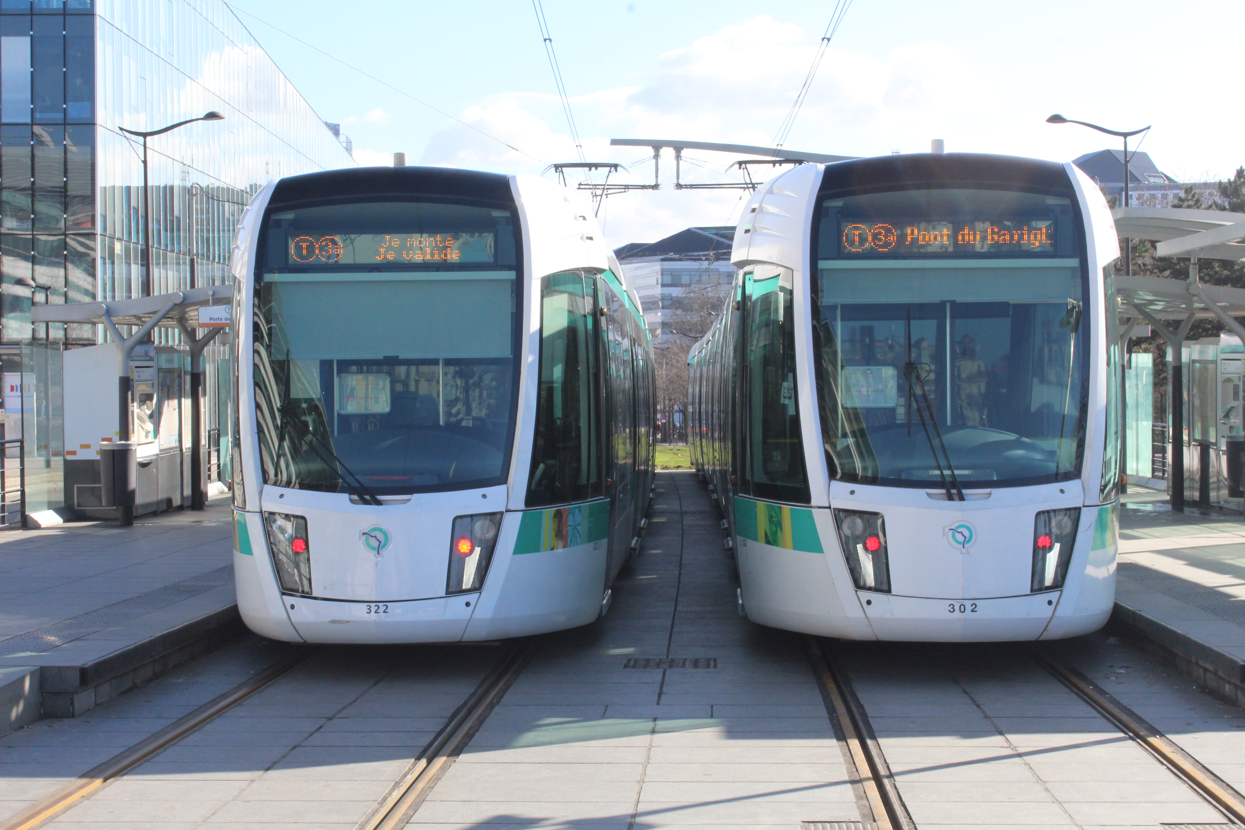 Tramway de la ligne 3a du tramway d'Île-de-France, station du Pont du Garigliano, Paris.